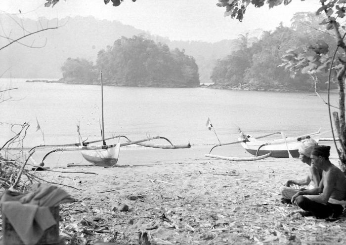 Repronegatief. Prauwen in Permissan-baai